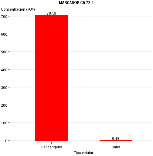 Comparación entre la concentración del marcador tumoral CA 72-4 en células cancerígenas y en células sanas.